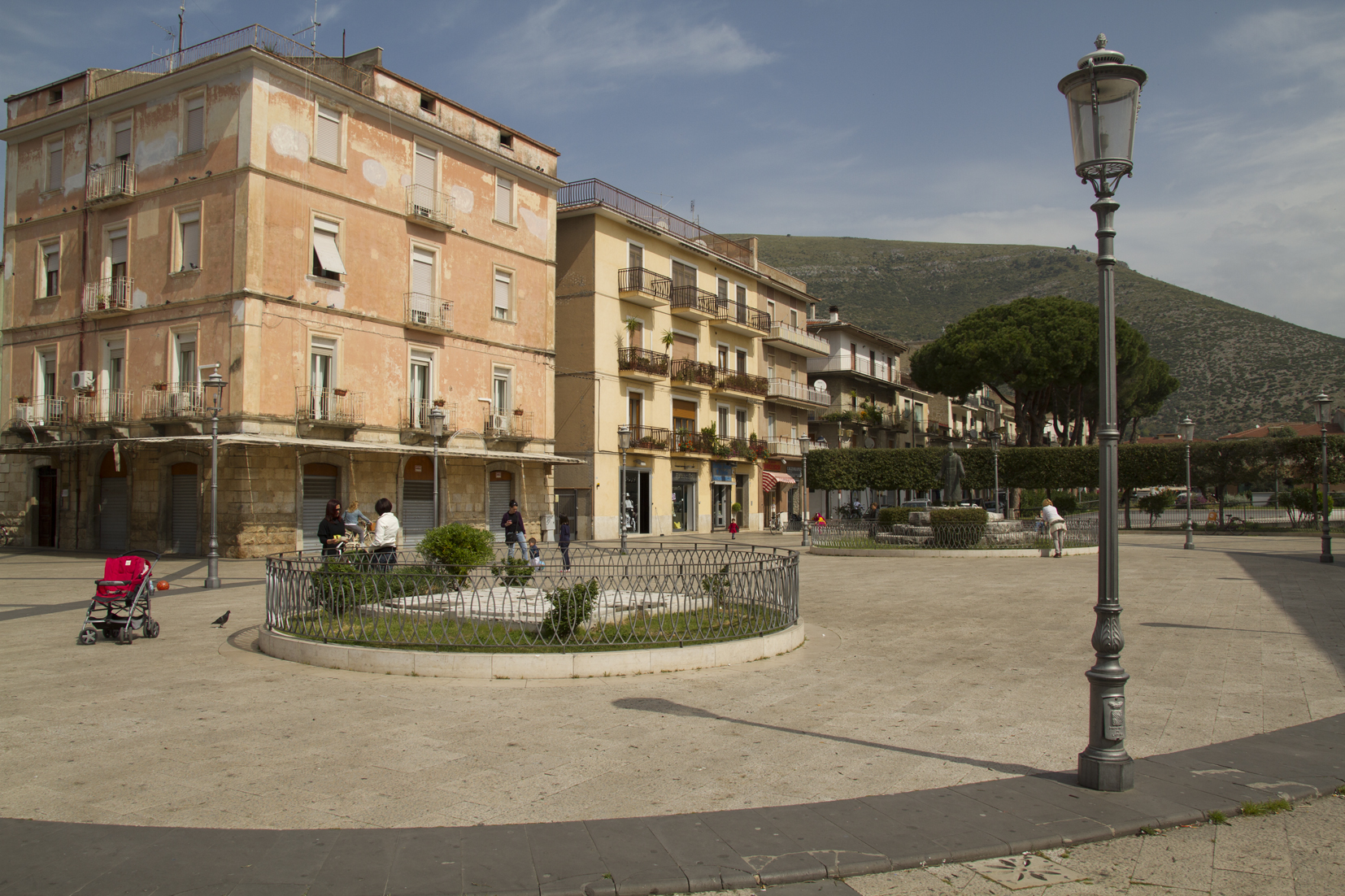 Piazza di Fondi